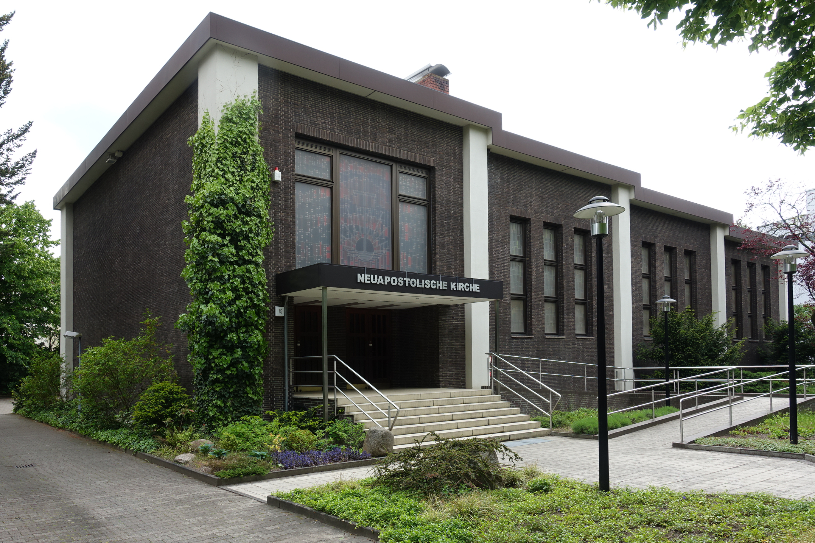 Die Neuapostolische Kirche in der Ravensberger Straße